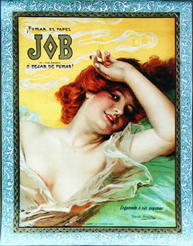 affiche de la collection JOB par Daniel Hernandez 1898